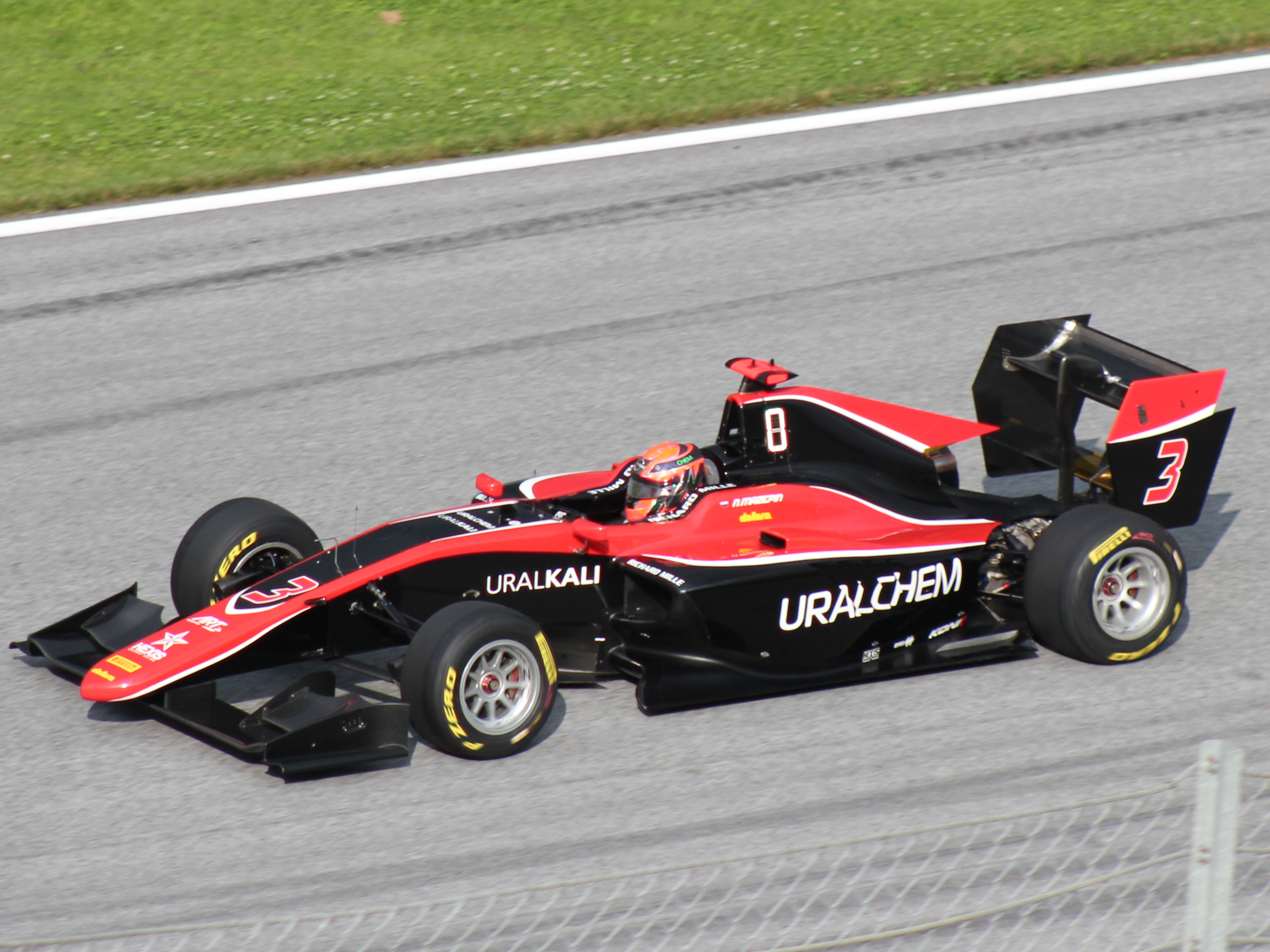 03 Nikita Mazepin beim Rennwochenende in Österreich 2018 (2)